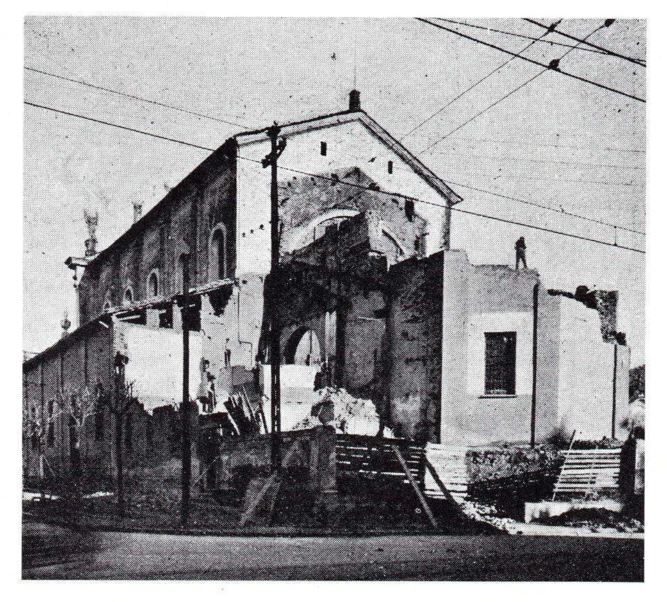 Demolizione di parte della chiesa di san Michele per il rifacimento della zona verso piazza Manzoni (1937). Progetto dell'architetto Maggi.